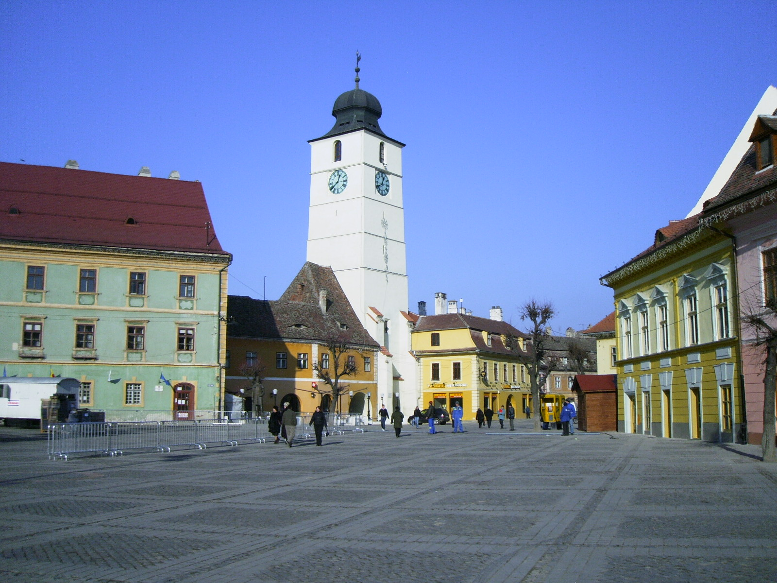 Der Ratturm an der Piața Mare (Großer Ring) in Sibiu (Hermannstadt).